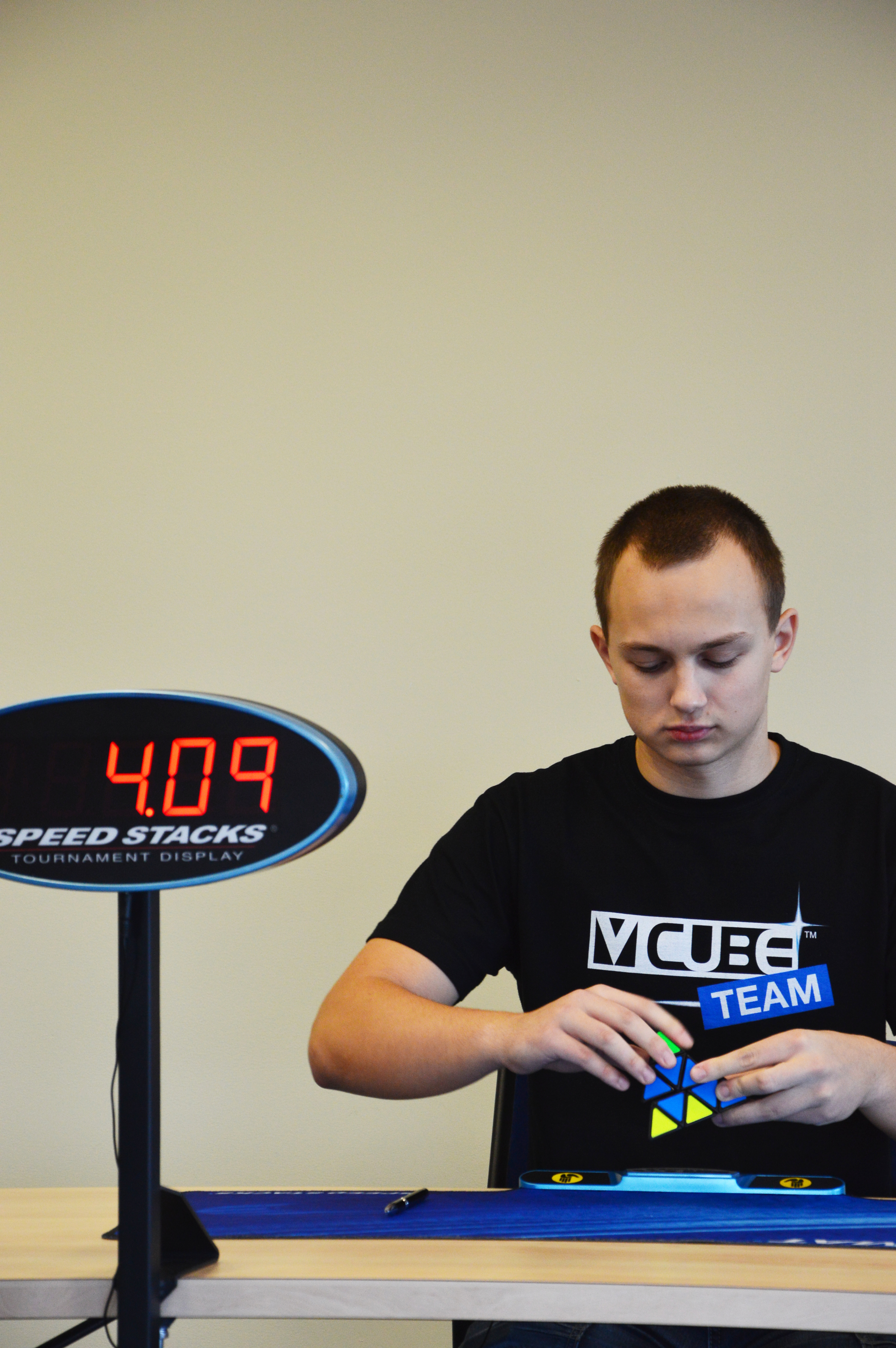 Püraminksi lahendamine. Vladislavs Baranovs Lätist. Estonian Open 2013.